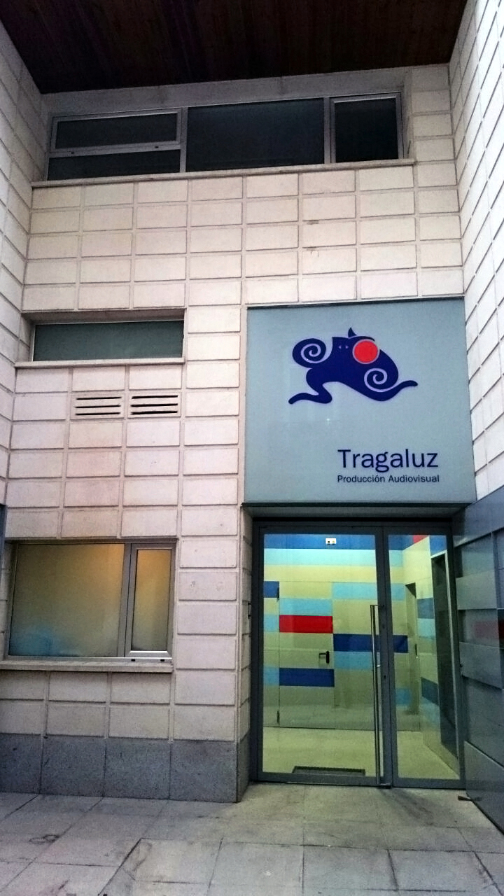 Aspecto actual de la fachada de la antigua iglesia protestante de la calle Muñoz Torrero de Badajoz capital. Imagen tomada el 19 de febrero de 2015 y retocada el 11 de marzo de 2016.